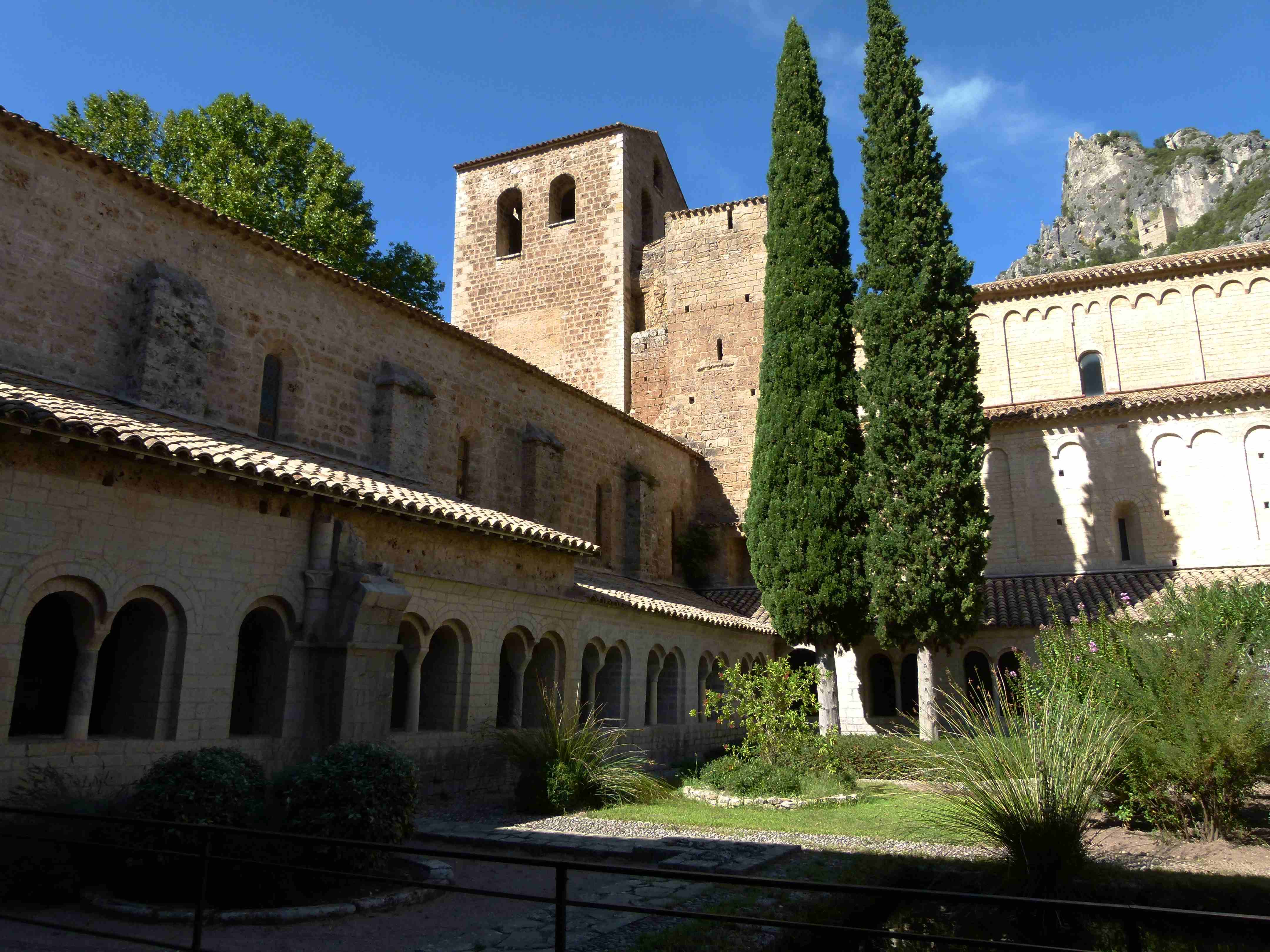 Abbaye de Gellone, cloître, Saint-Guilhem le-Désert